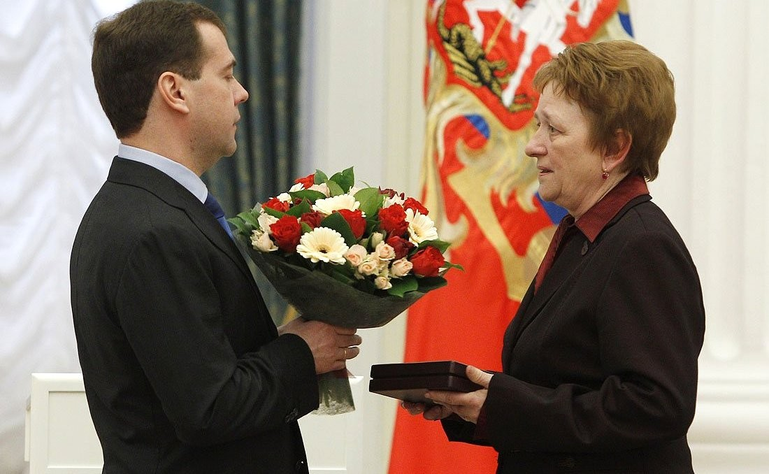 Президент Российской Федерации Дмитрий Медведев вручает медаль "Золотая Звезда" Людмиле Ширяевой - матери погибшего Героя Российской Федерации Григория Ширяева